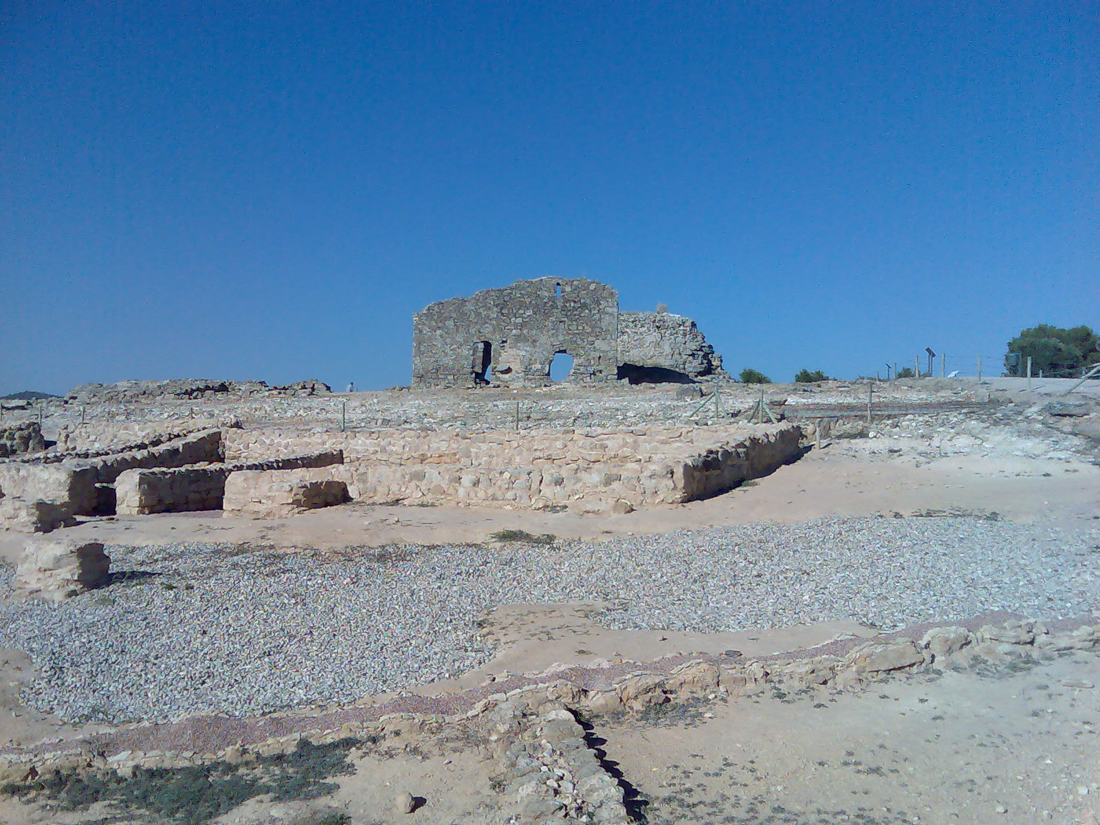 Vista de las excavaciones de Recópolis